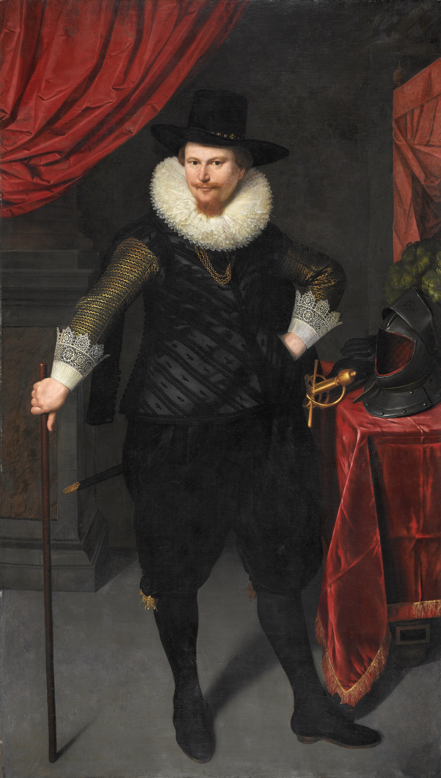 Portret van Laurens Reael (1583-1637). Gouverneur-generaal van Nederlands Oost-Indië (1616-19), sedert 1625 bewindhebber der Verenigde Oostindische Compagnie te Amsterdam. Staande, ten voeten uit, met een stok in de rechterhand, de linkerhand in de zij. Rechts een tafeltje waarop en helm en handschoenen liggen. Pendant van SK-A-3742.; Cornelis van der Voort (1576–1624), olieverf op doek, ca. 1620